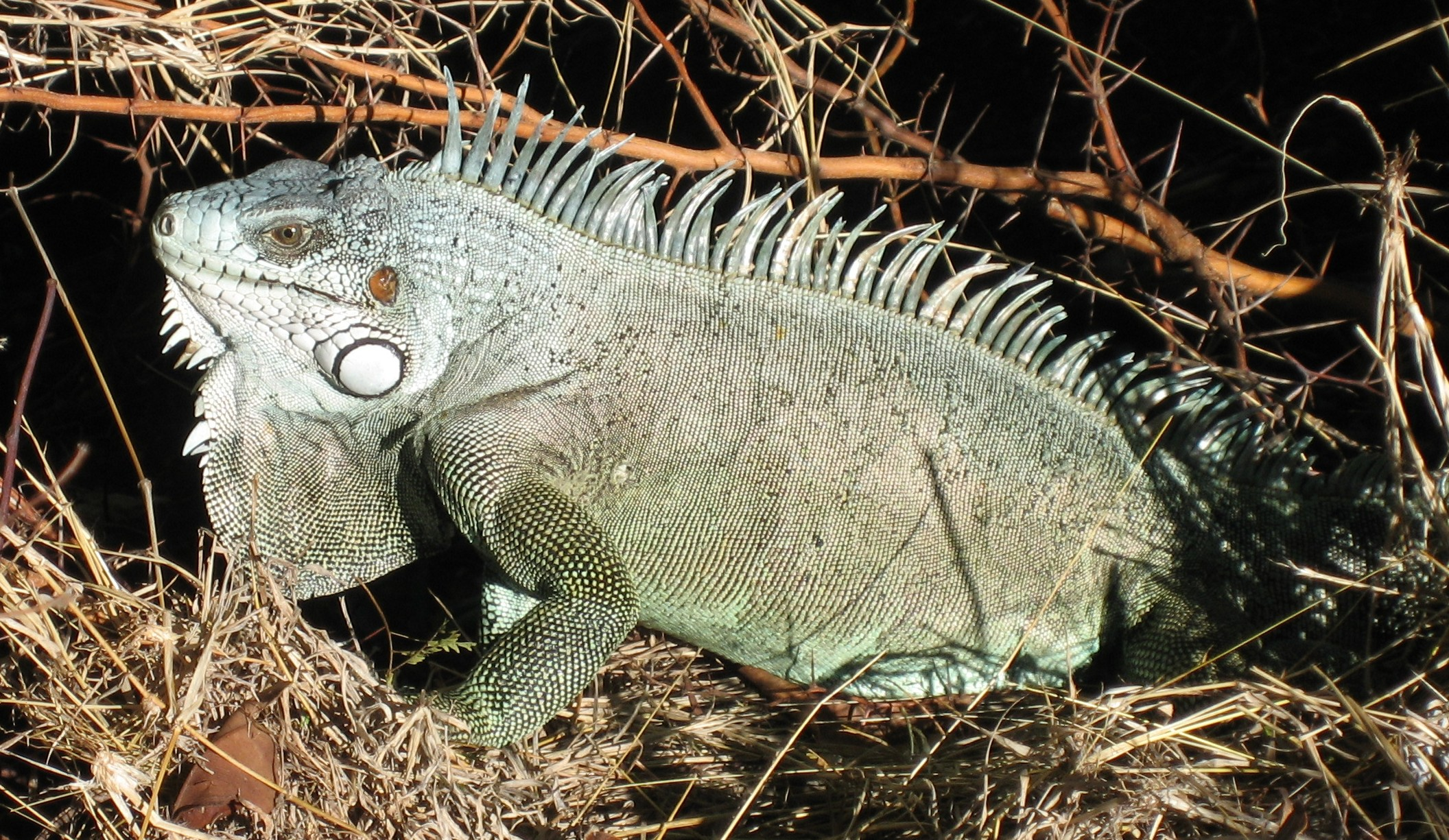 Iguana iguana au Fort Napoléon en Guadeloupe, îlet Terre de haut-de-haut l'archipel Saintes